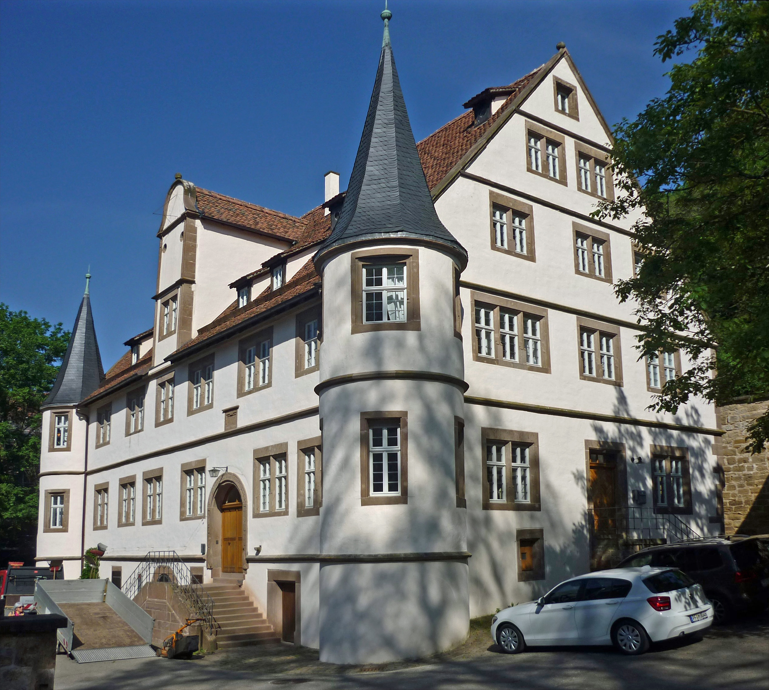 Kloster Maulbronn, Schloss